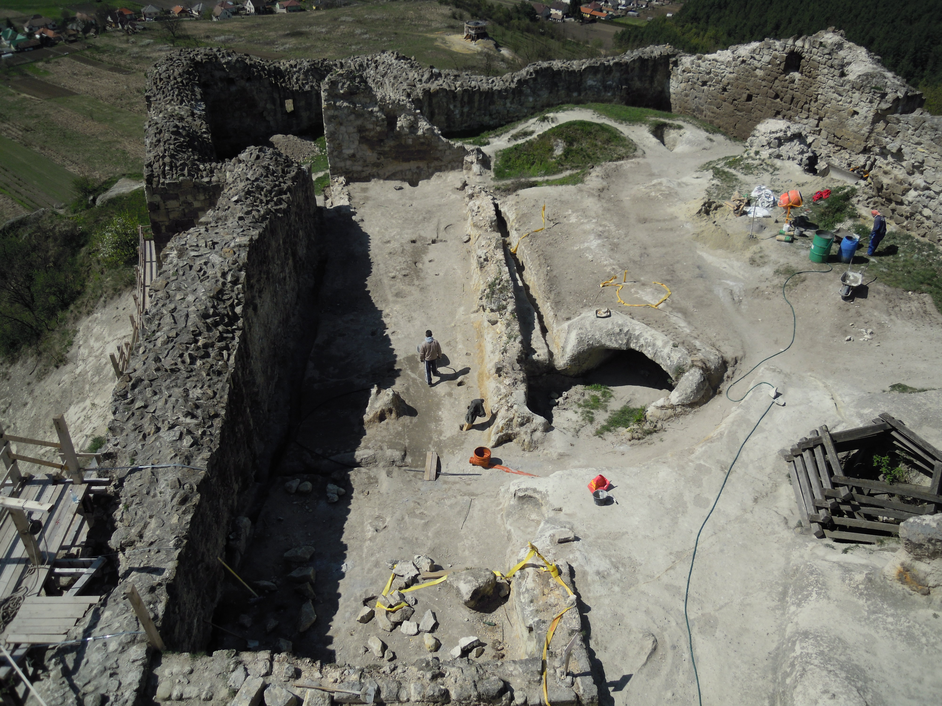 Siroki vár alsóvár feltárása This is a photo of a monument in Hungary. Identifier: 5838